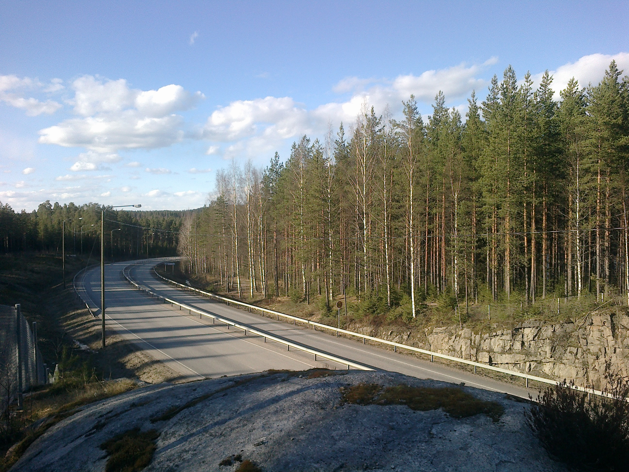 Valtatie 4 (E75) pohjoisen suuntaan Äänekosken eteläpuolella